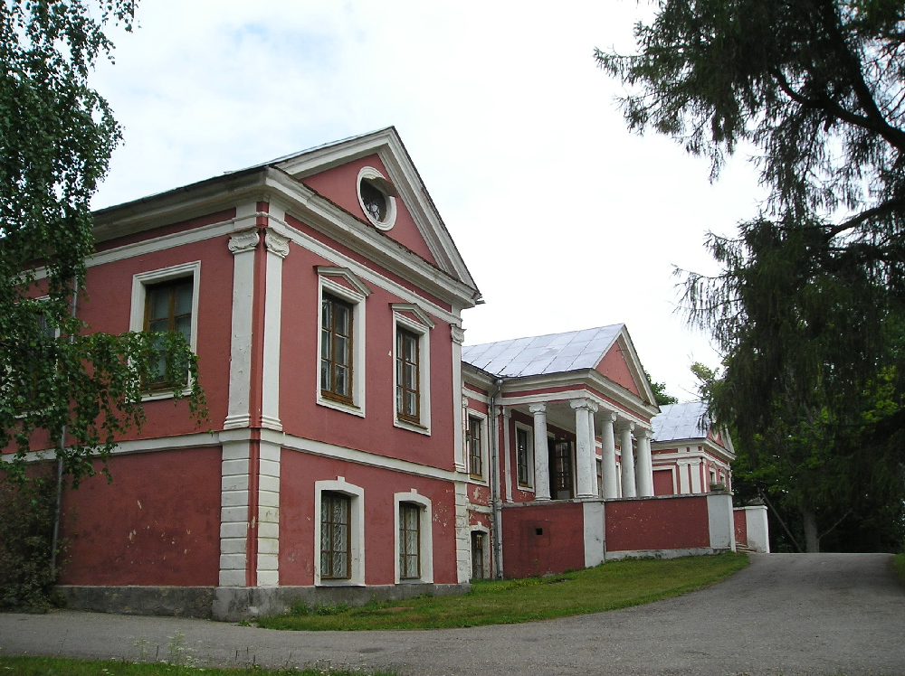 Õisu mõis Viljandimaal.